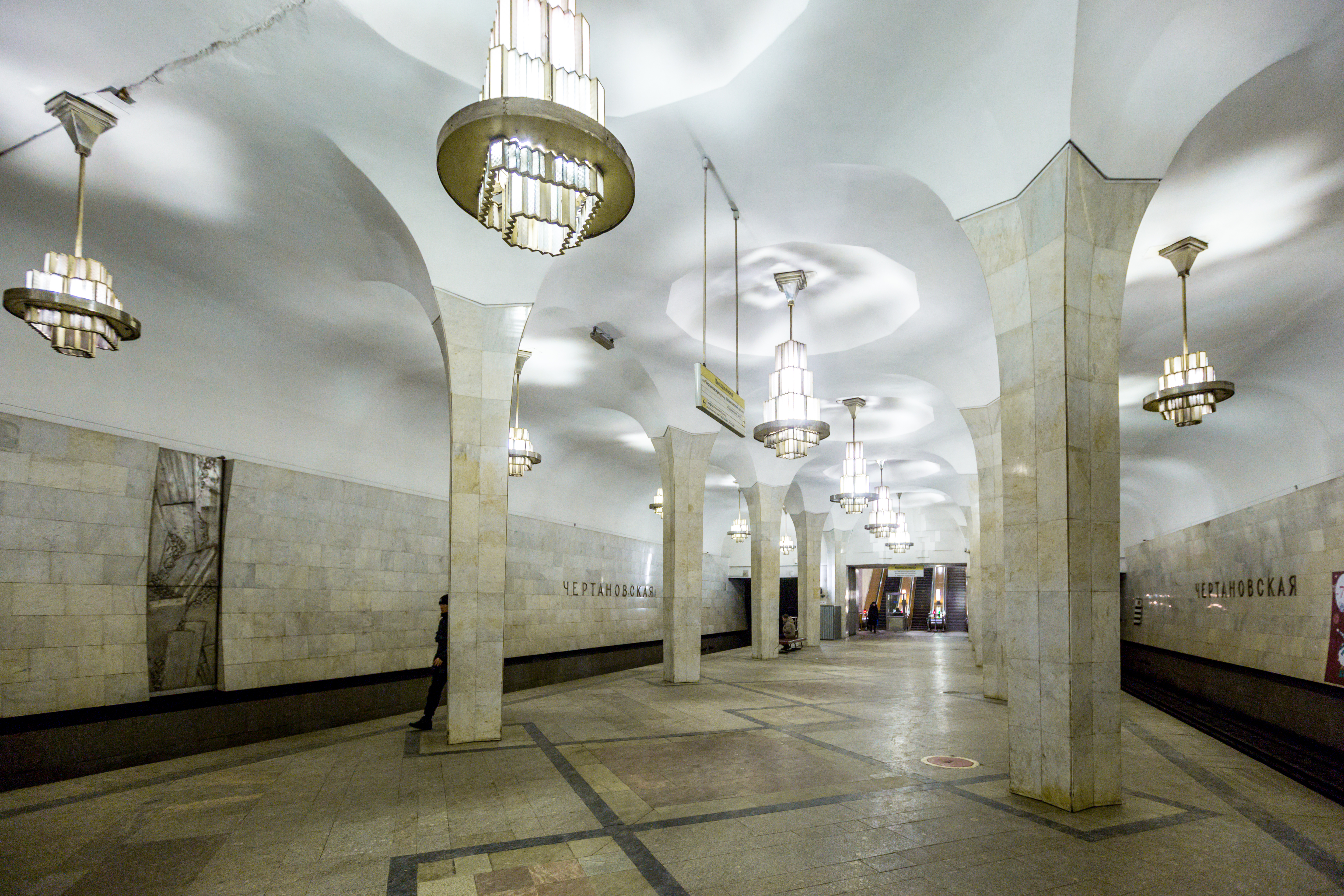 Чертановская (станция метро)